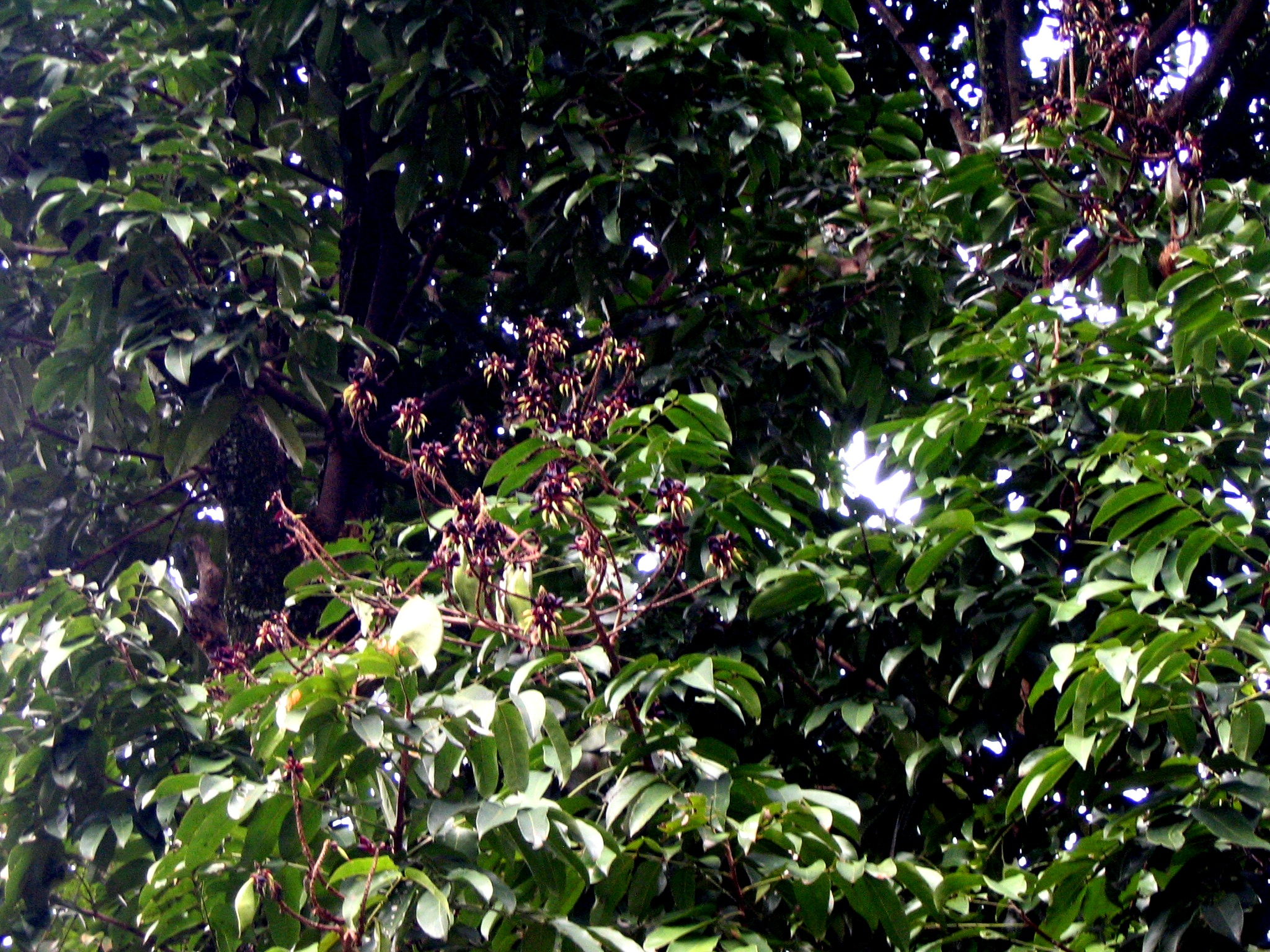 Callerya atropurpurea - feuillages - Bukit Nanas Forest reserve Kuala Lumpur